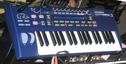 Novation UltraNova